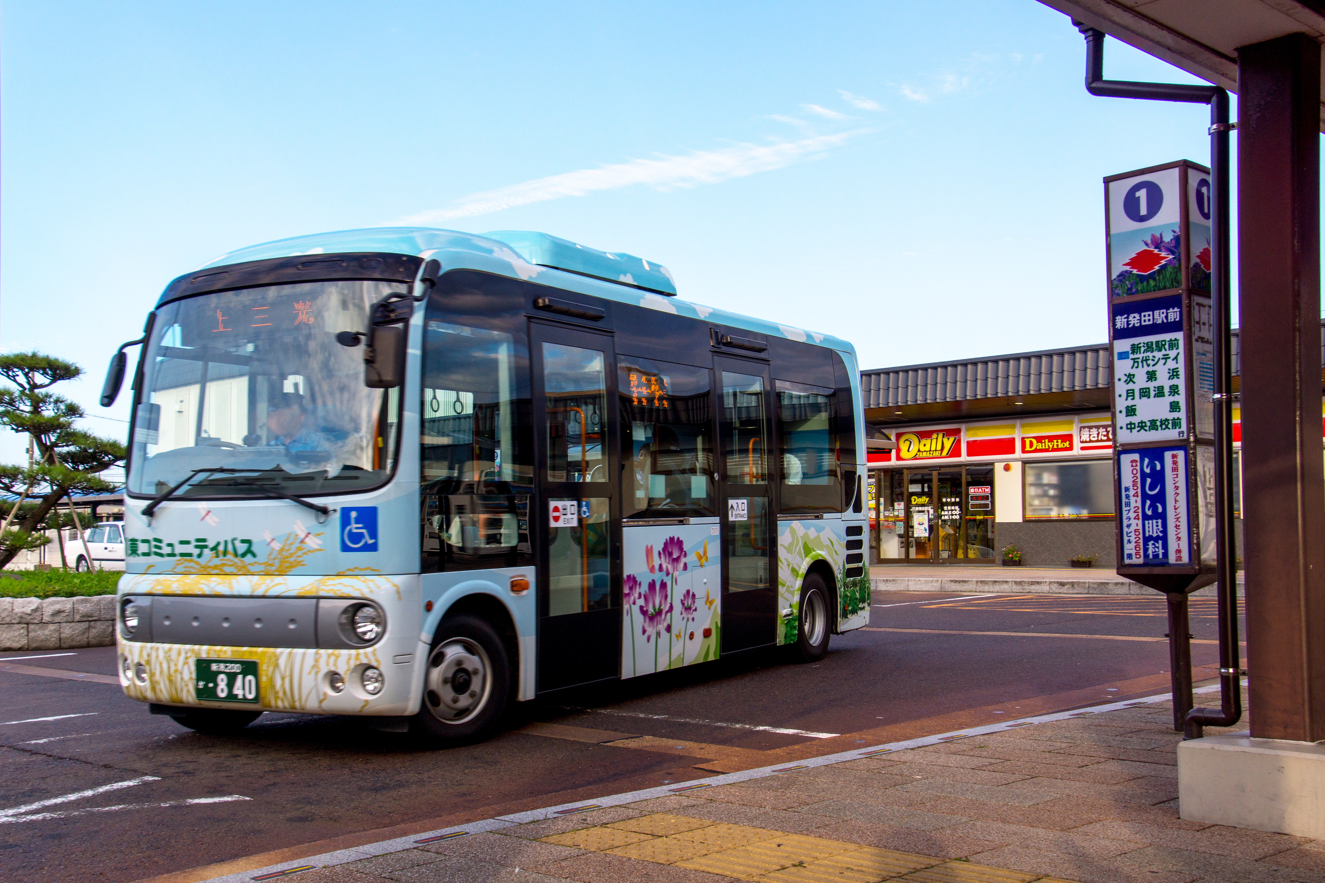 川東コミュニティバス車両（2017年9月、新発田駅）